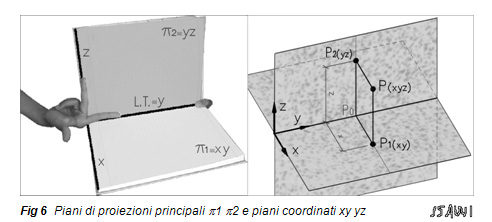 Piani di proiezione nel metodo di Monge, Di cui un piano e' orizzontale (Pigreco1) l'altro verticale.